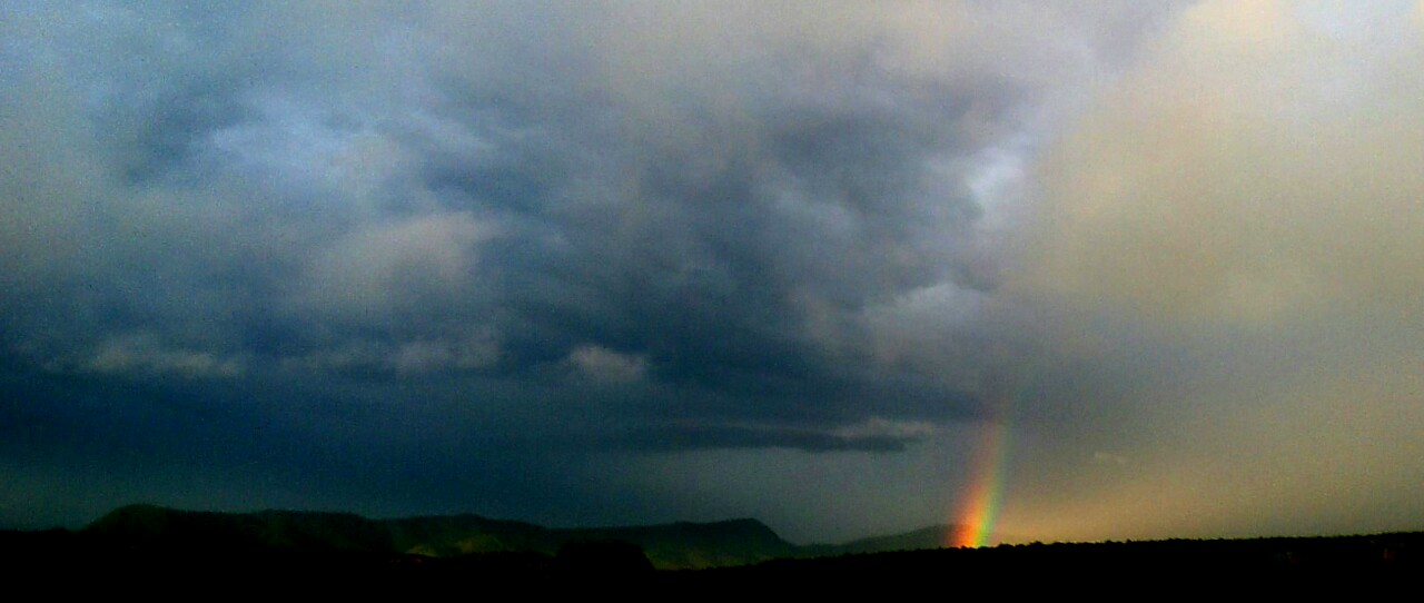 Formação de arco-íris na zona rural do município de Divisa Nova .